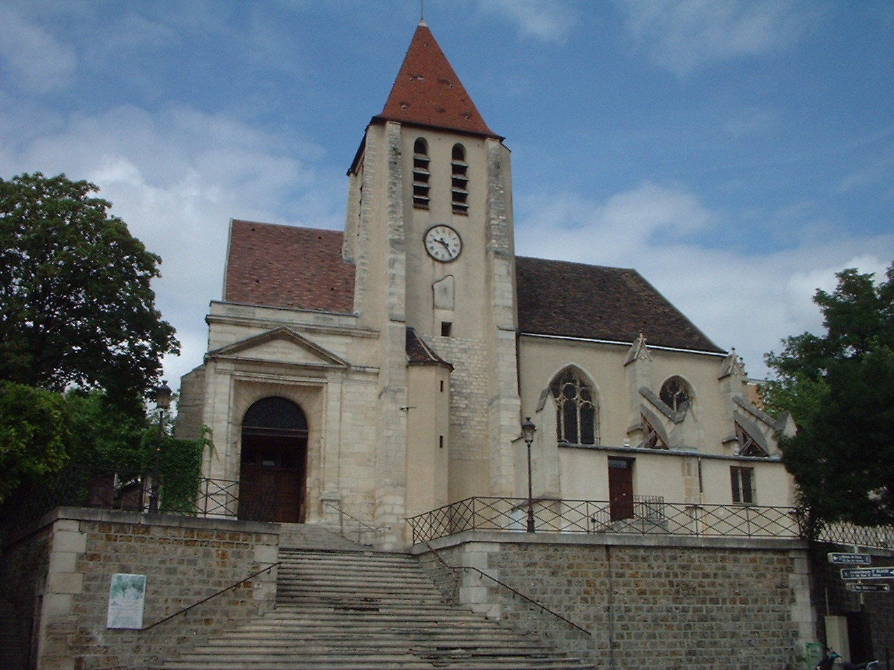 Église Saint Germain de Charonne Paris